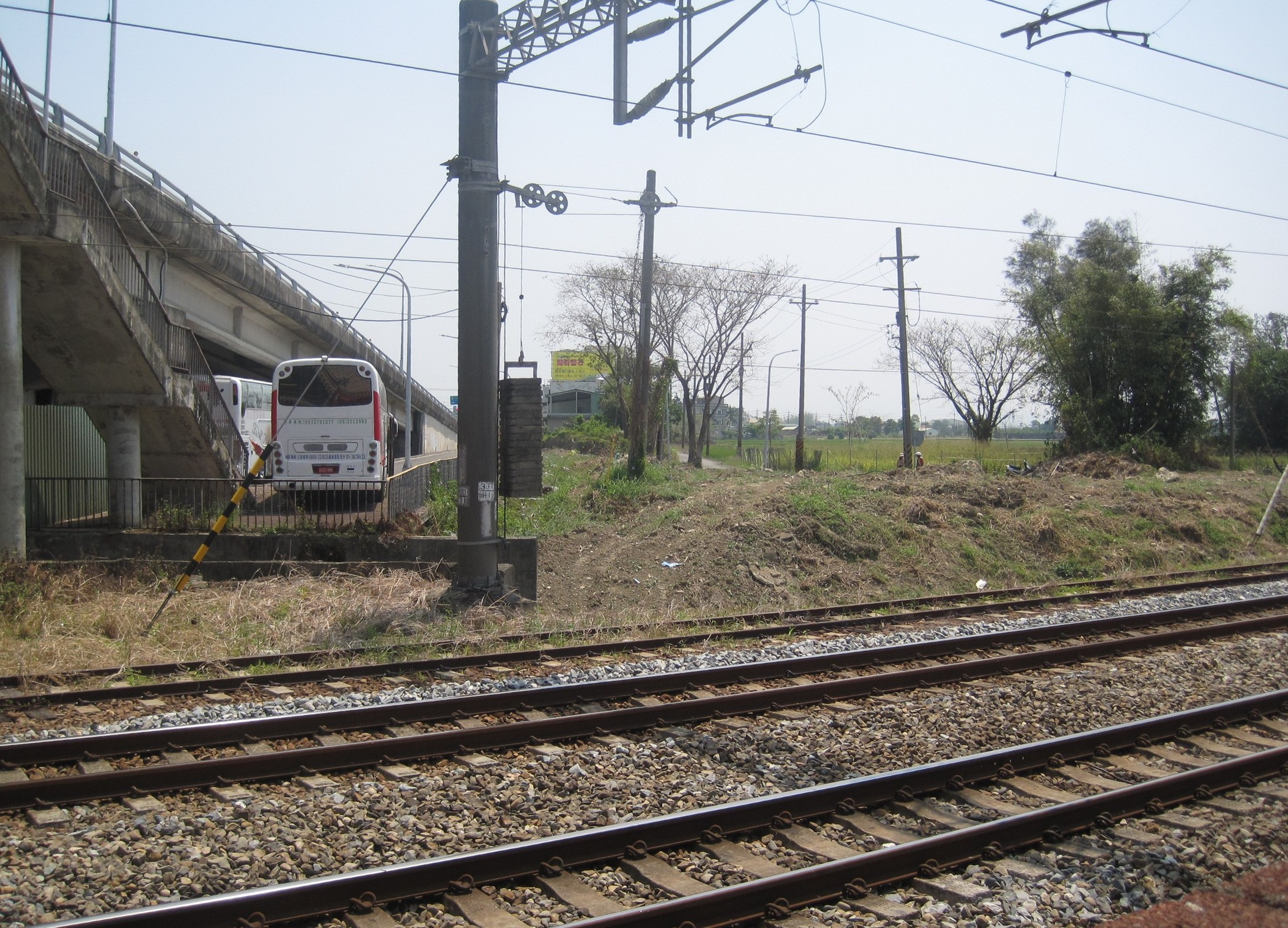 隆田義聖宮旁的鐵路。過去在1961年發生重大事故的隆田平交道曾位在這附近。